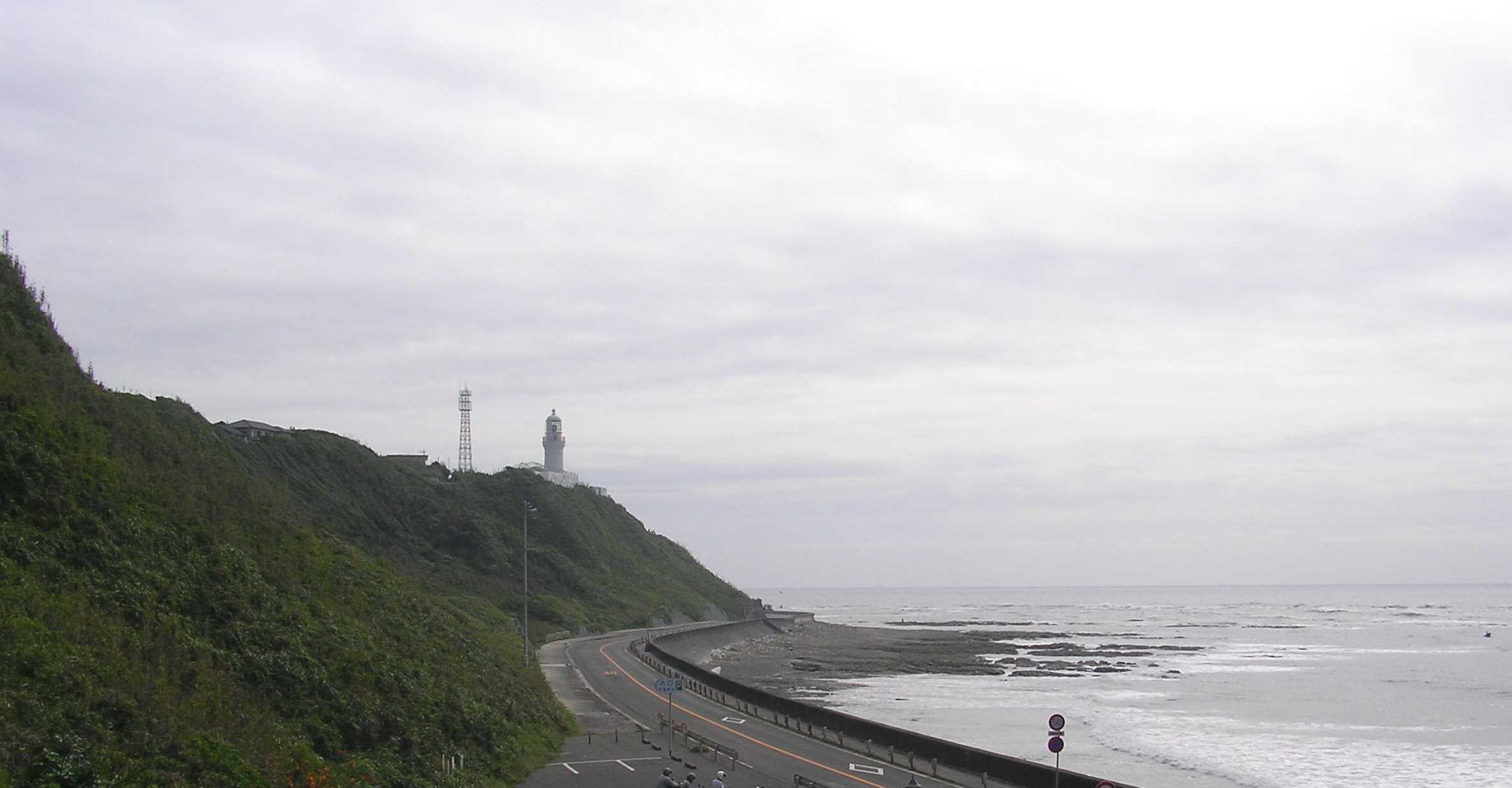 御前崎と灯台を西方丘陵上から。2006年9月、投稿者撮影。